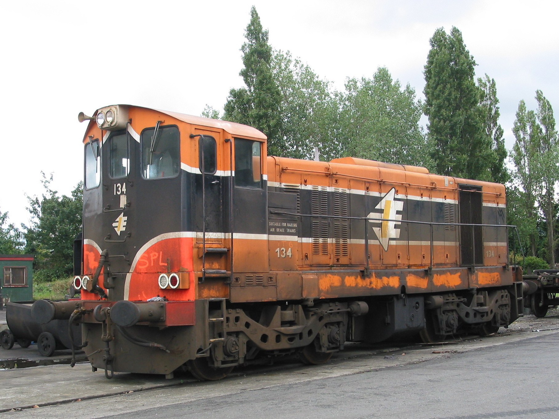 Córas Iompair Éireann 134 at Inchicore Railway Works